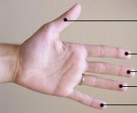 Hand